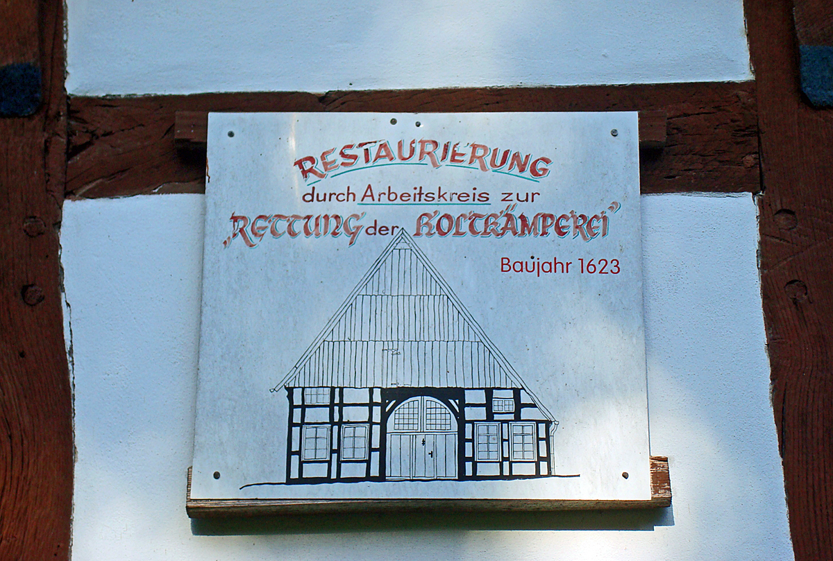 An der Holtkämperei in Gütersloh-Isselhorst